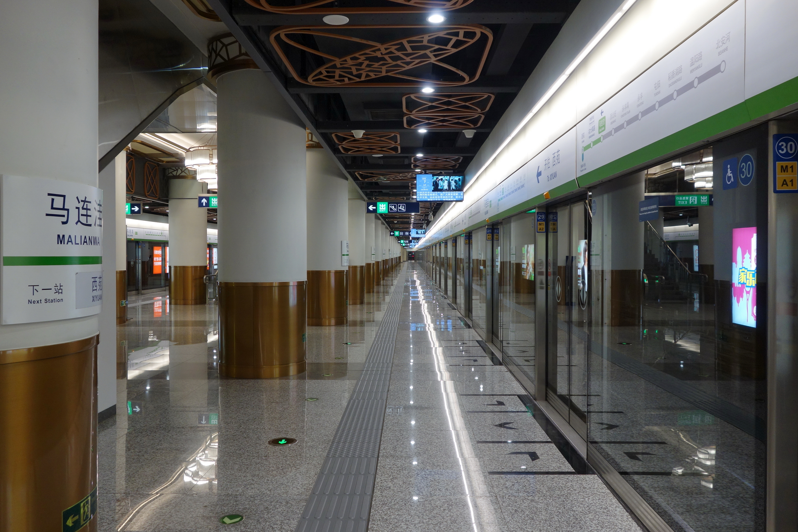 北京地铁16号线马连洼站去往西苑方向站台。